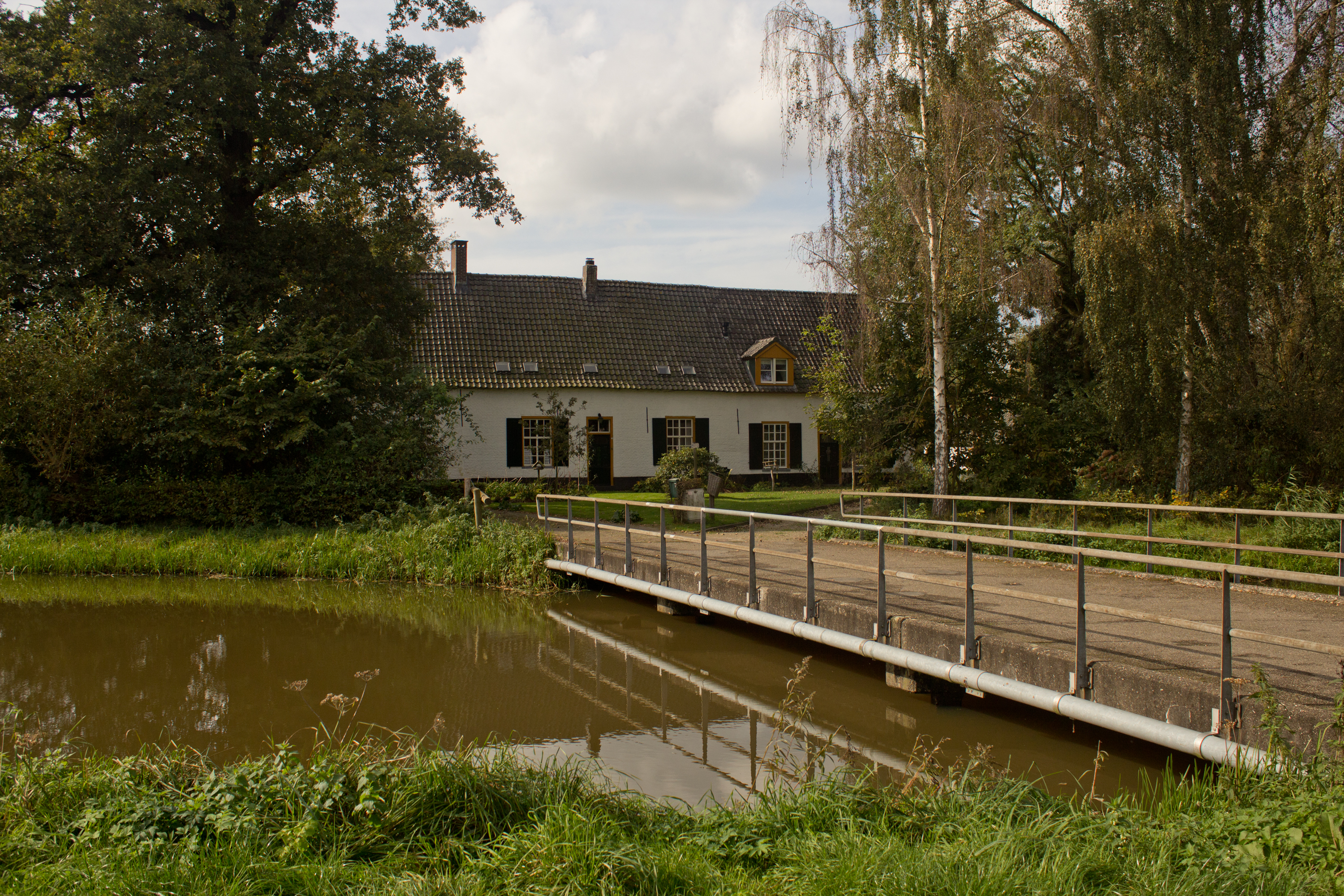 Spoordonk: voormalig voorhof van Huize ten Bergh